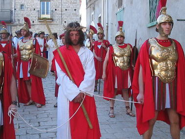 Processione del VenerdÃ¬ Santo Maschito